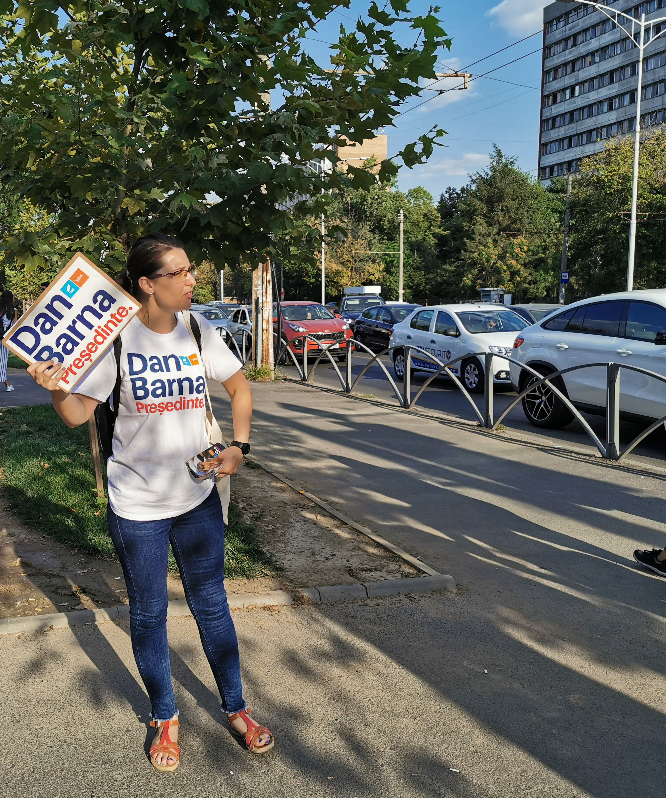 Strângere semnături pentru Dan Barna președinte, București.